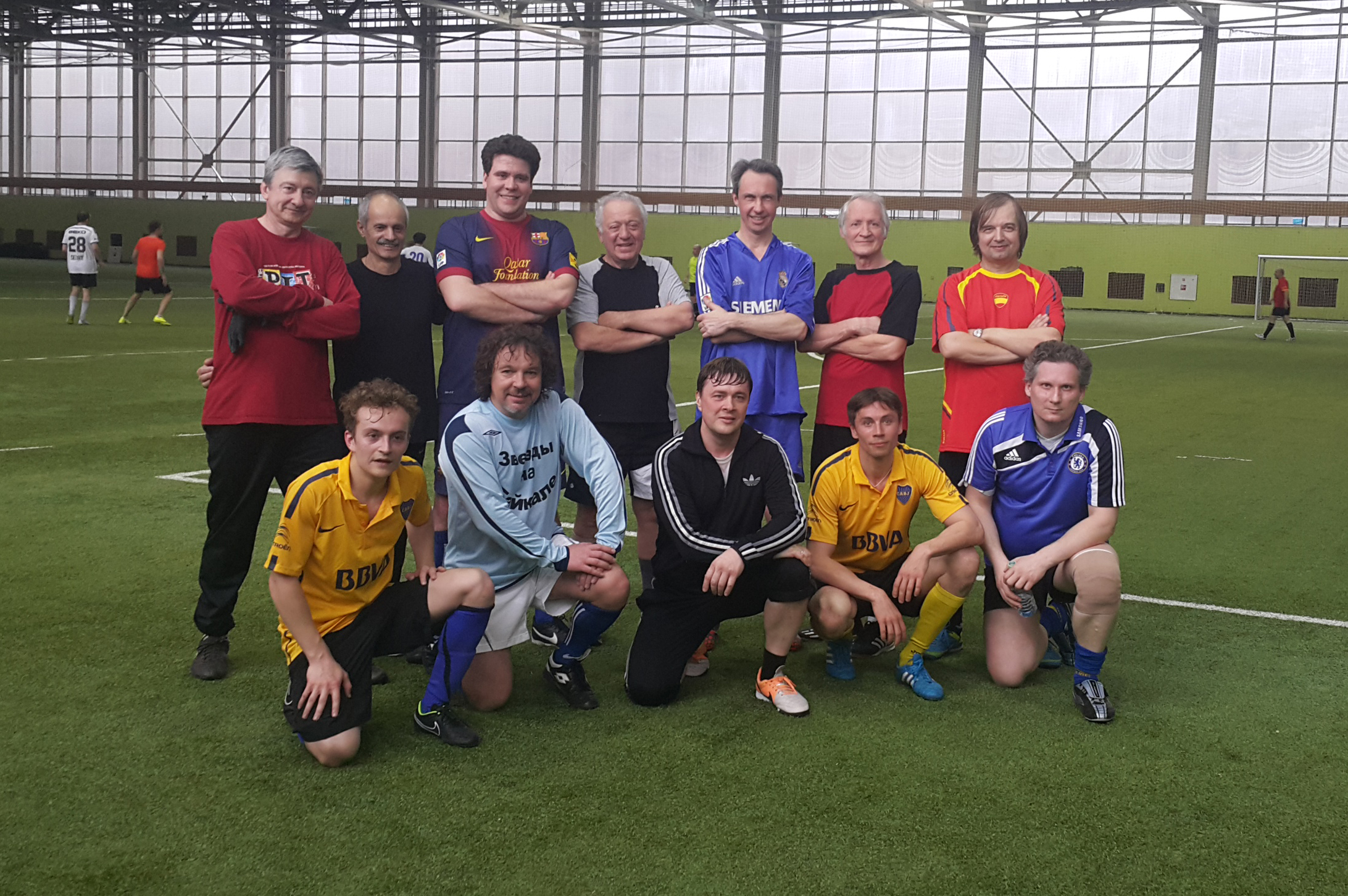 Народные артисты России Владимир Овчинников и Денис Мацуев, дирижер Юрий Ткаченко, Александр Третьяков и другие.